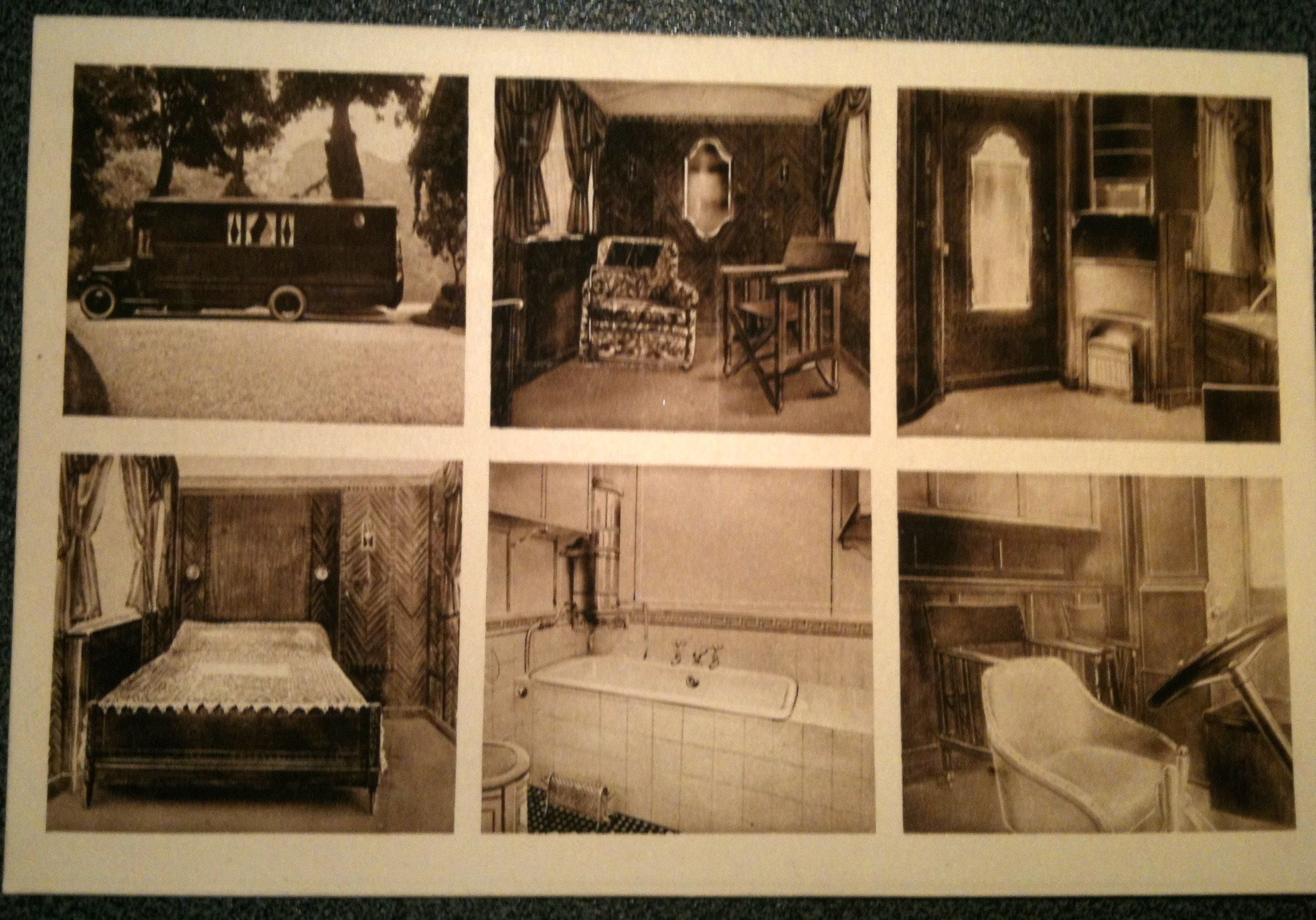 Roulotte automobile de Raymond Roussel (Carte postale, 1925)